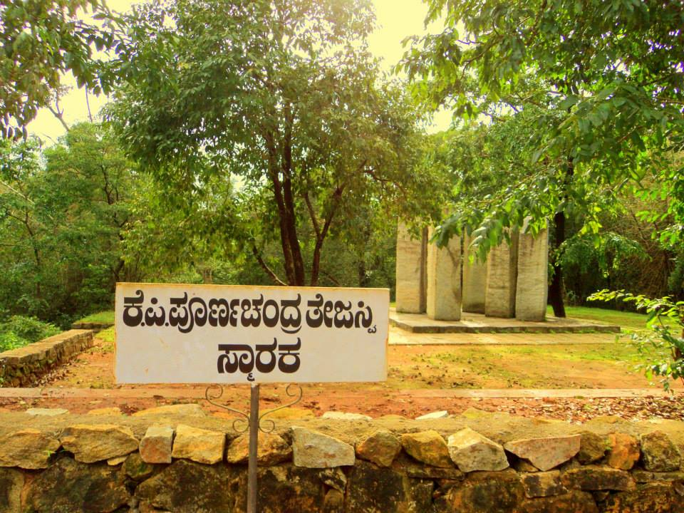 ಕನ್ನಡ: ತೇಜಸ್ವಿ ಸ್ಮಾರಕ